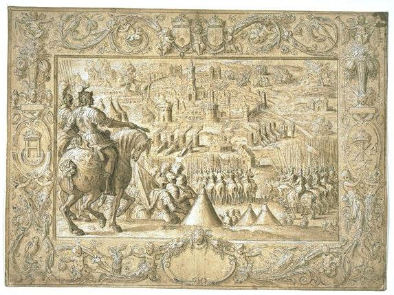 dessin de la défaite du siège de Metz par Charles Quint